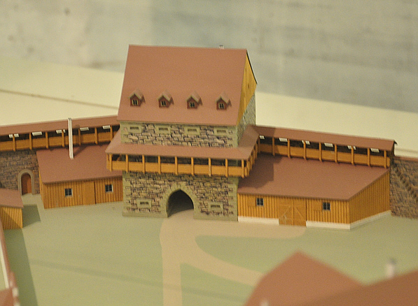 St. Gallen, Lapidarium, Modell des Stiftsbezirks St. Gallen um 1750, Modell von Mark Eisenhut; Detail: Abtstor (Karlstor)